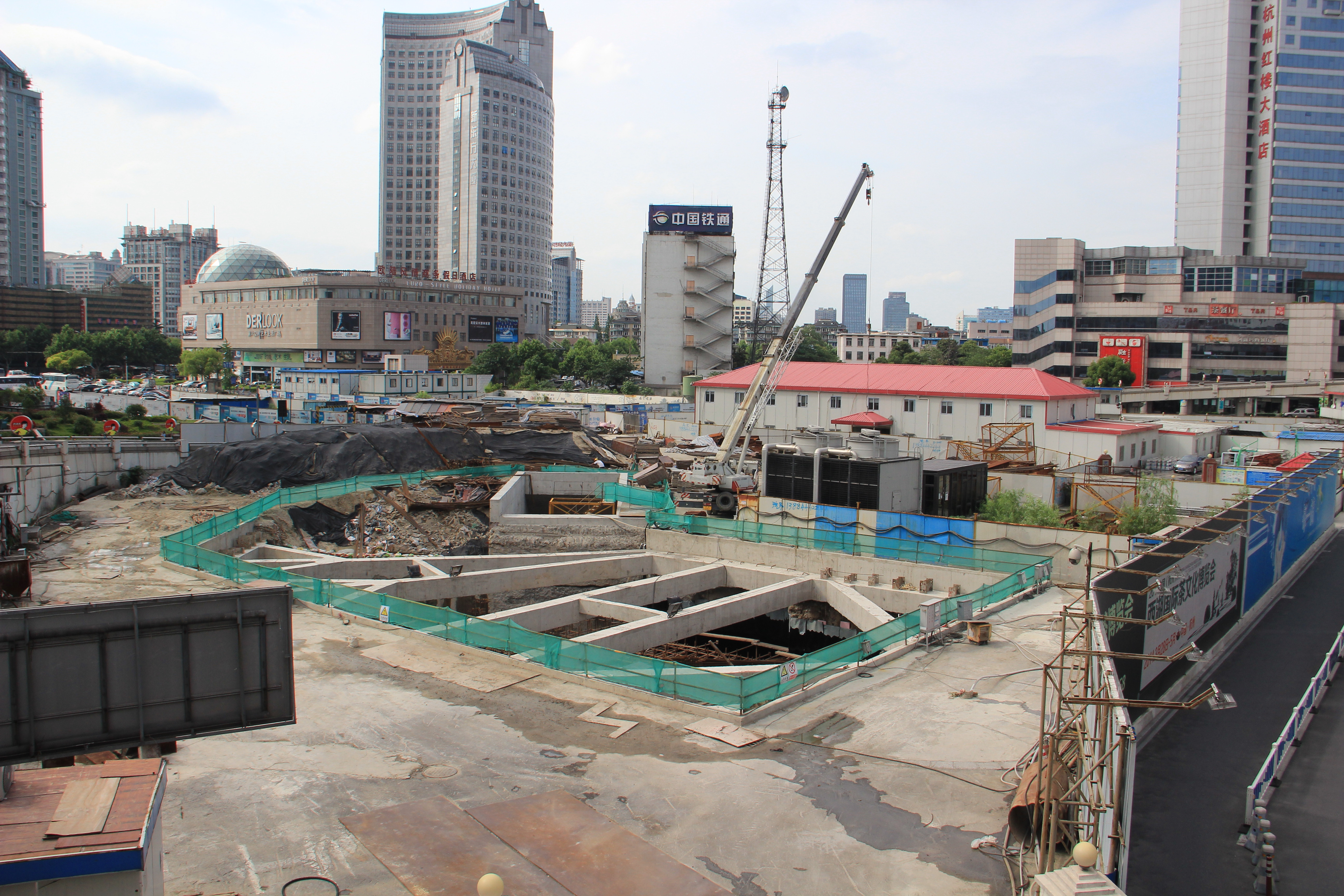 中文（中国大陆）: 杭州地铁5号线城站站基坑